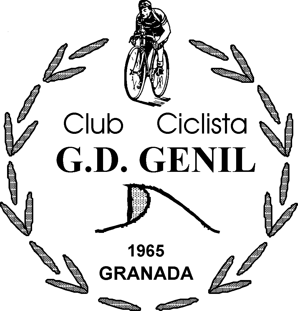 Escudo del Grupo Deportivo GENIL, Granada, en su inauguración el 10 de Abril de 1965.